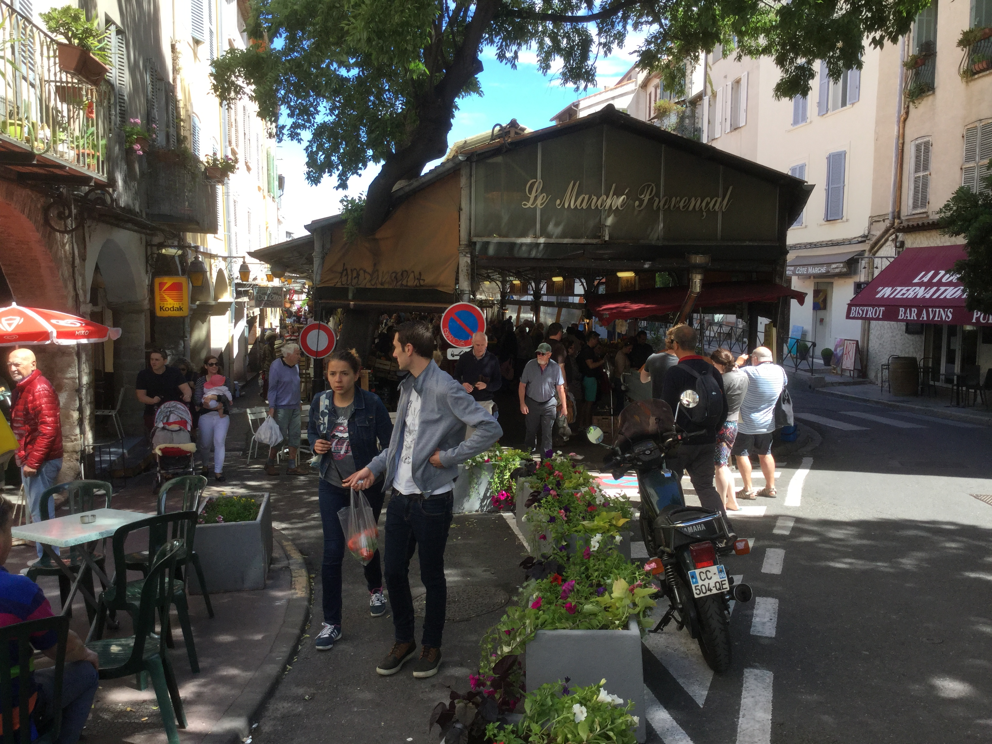 Marché provencal i Antibes, maj 2016